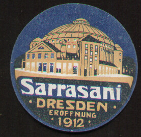 Zirkus Sarrasani in Dresden, Eröffnung 1912. Vignette. Der Durchmesser beträgt ca. 6,5 cm